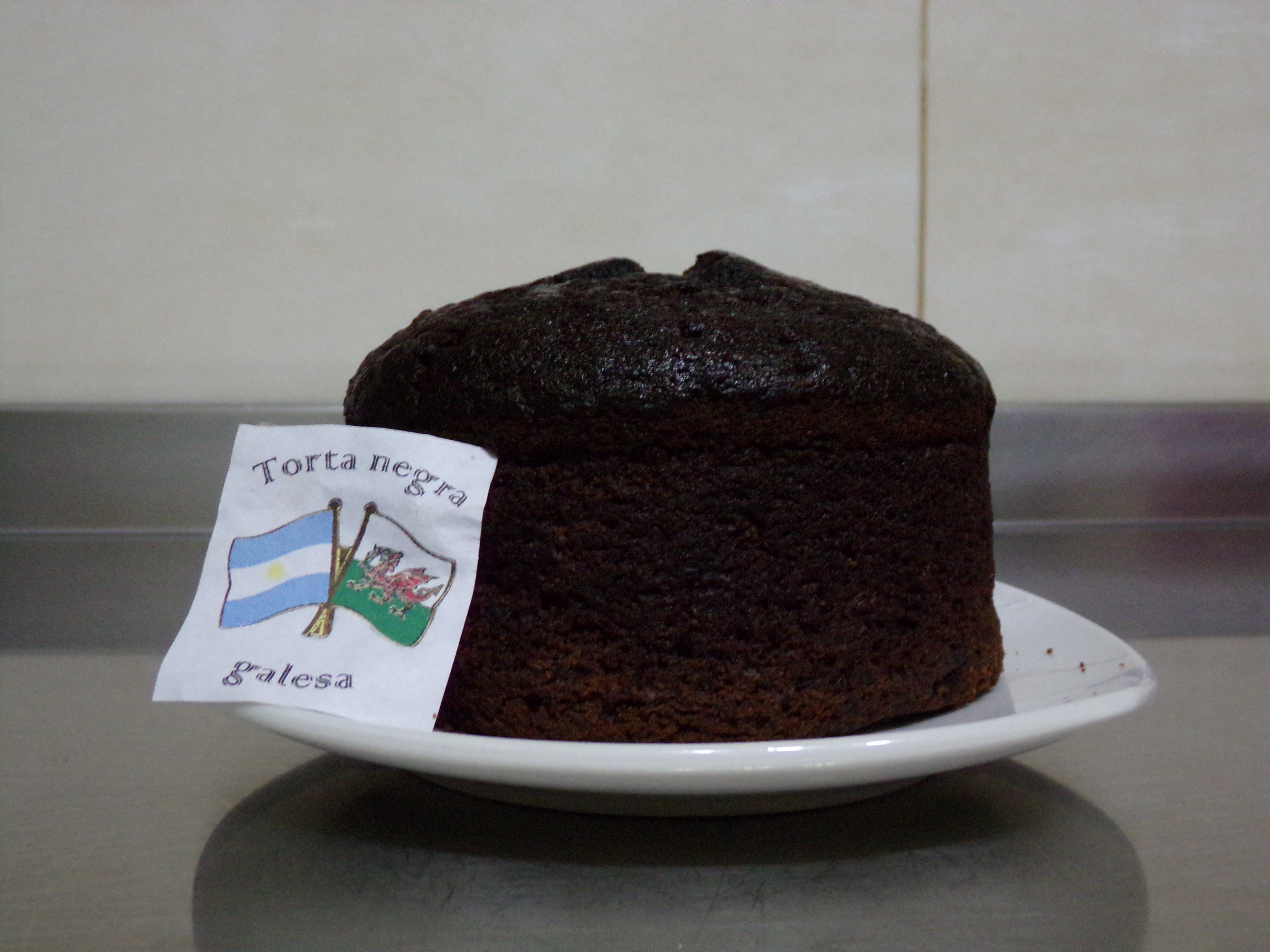 Desde 1865, es un plato tradicional de la provincia de Chubut (Argentina) merced a la inmigración galesa llamándosele aquí torta negra galesa o, sencillamente, torta negra (en galés: Cacen ddu).